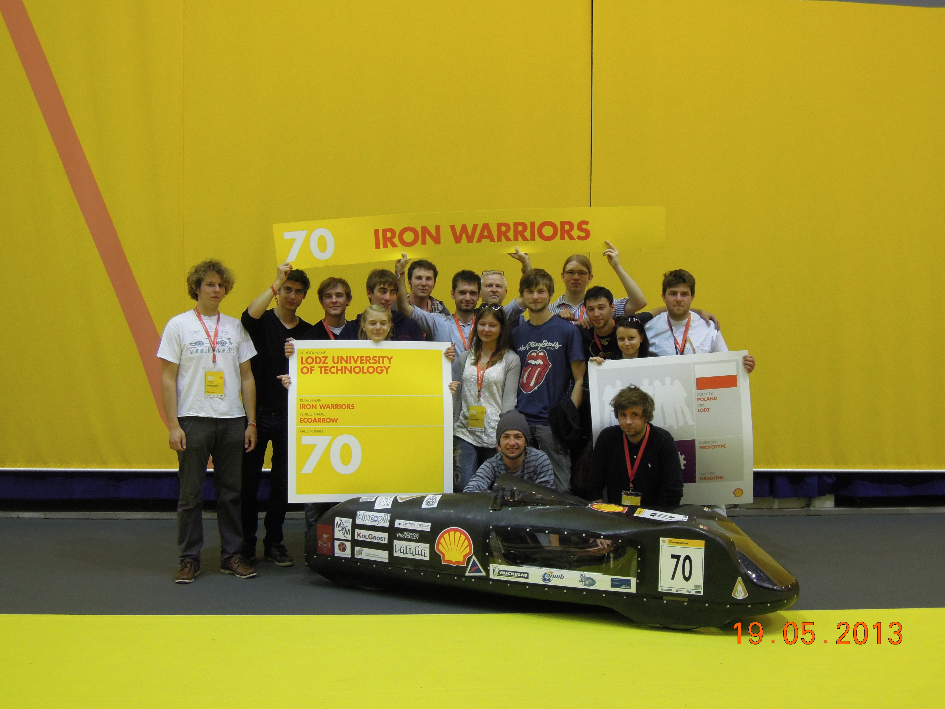 Shell Eco-marathon 2013 Rotterdam